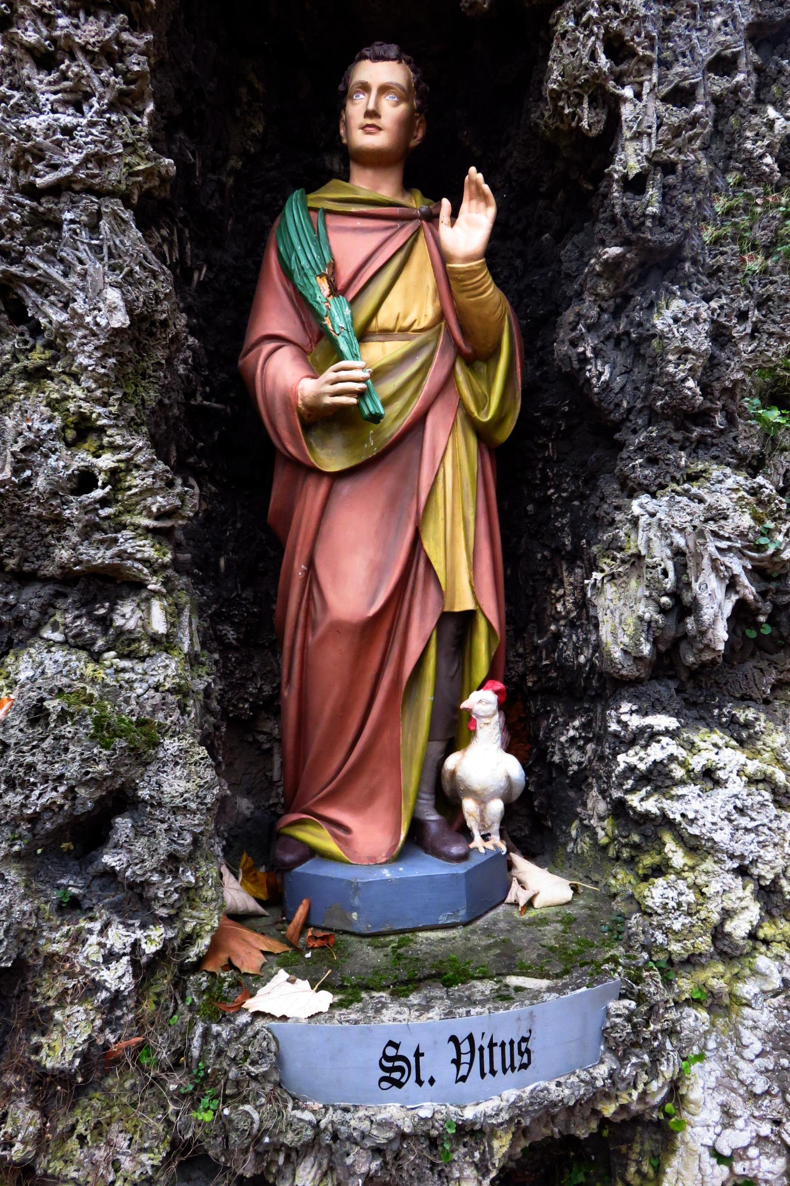 Grottenanlage in Hehn Heiligenpesch / Christliche Figuren in Mönchengladbach